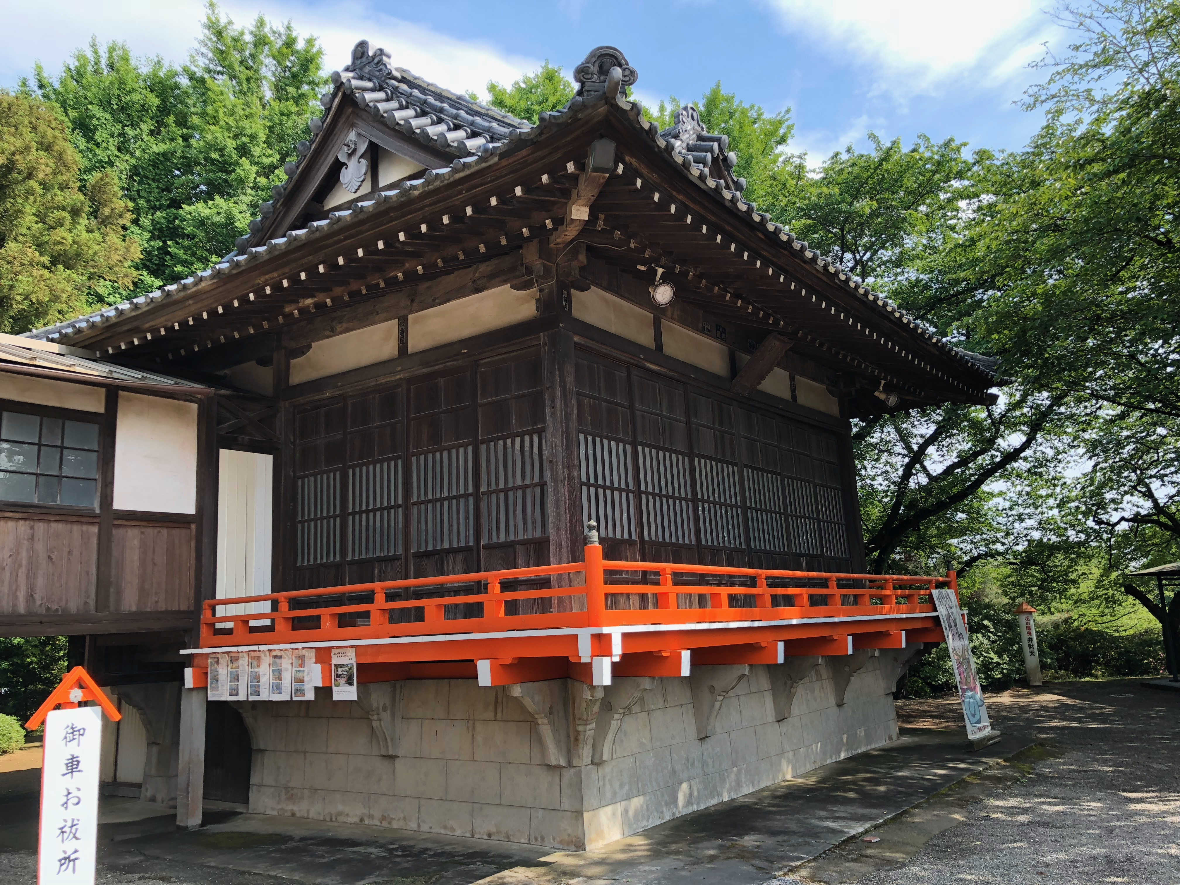 館林尾曳稲荷神社、演芸殿